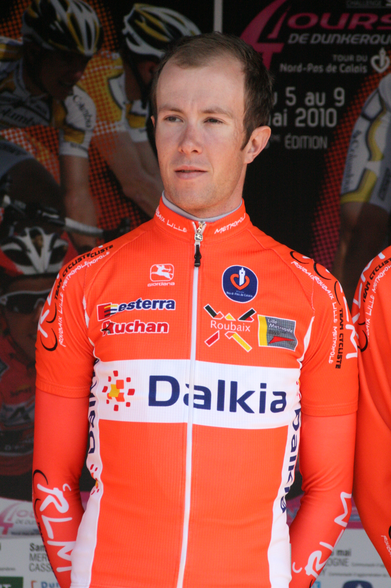 Clément Lhotellerie lors de la présentation des équipes des 4 jours de Dunkerque 2010